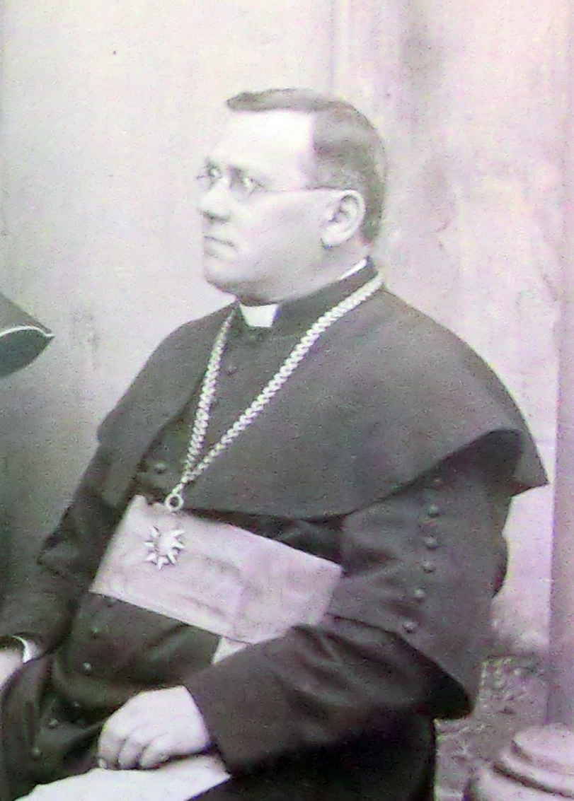 Kanovník Václav Sitte při setkání s litoměřickým biskupem Emanuelem Schöblem (cca 1904)